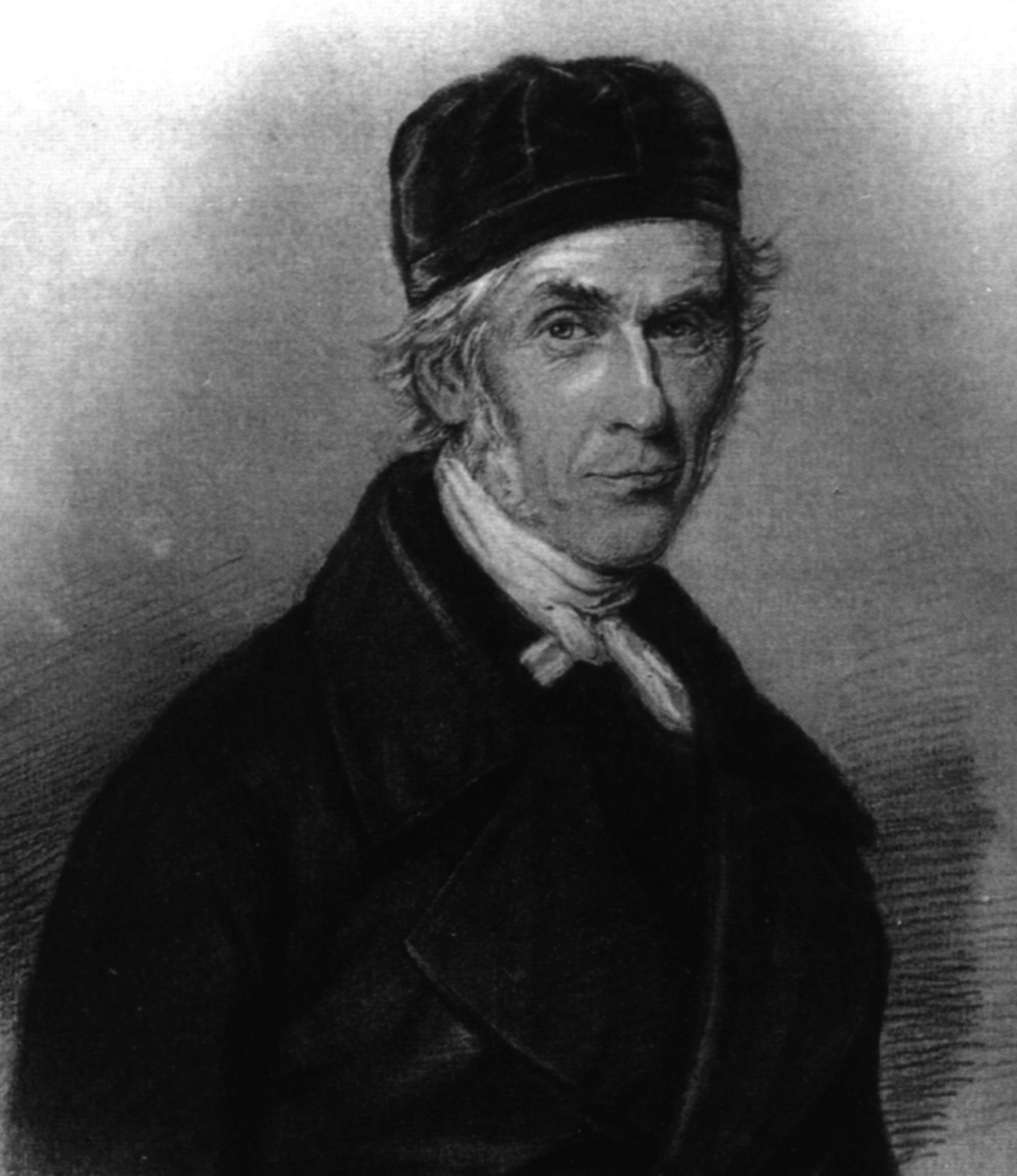 Portrait von Johann Philipp Dieffenbach (1786-1860), Rektor der Friedberger Augustinerschule und regionaler Altertumsforscher. In der verwendeten Quelle angegebener Bildnachweis: Friedberg, Stadtarchiv Authority control VIAF: 67208386 GND: 11610032X